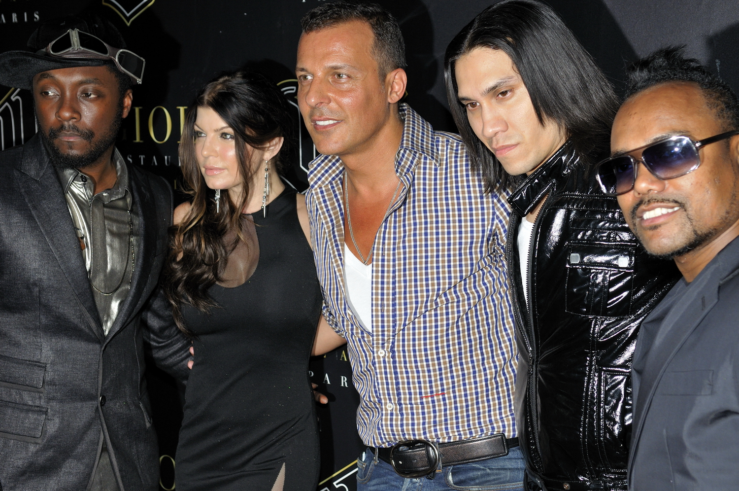 Les Black Eyed Peas avec Jean-Roch Les Black Eyed Peas en concert privé au VIP Room Paris. avec will.i.am, apl.de.ap, Taboo et Fergie